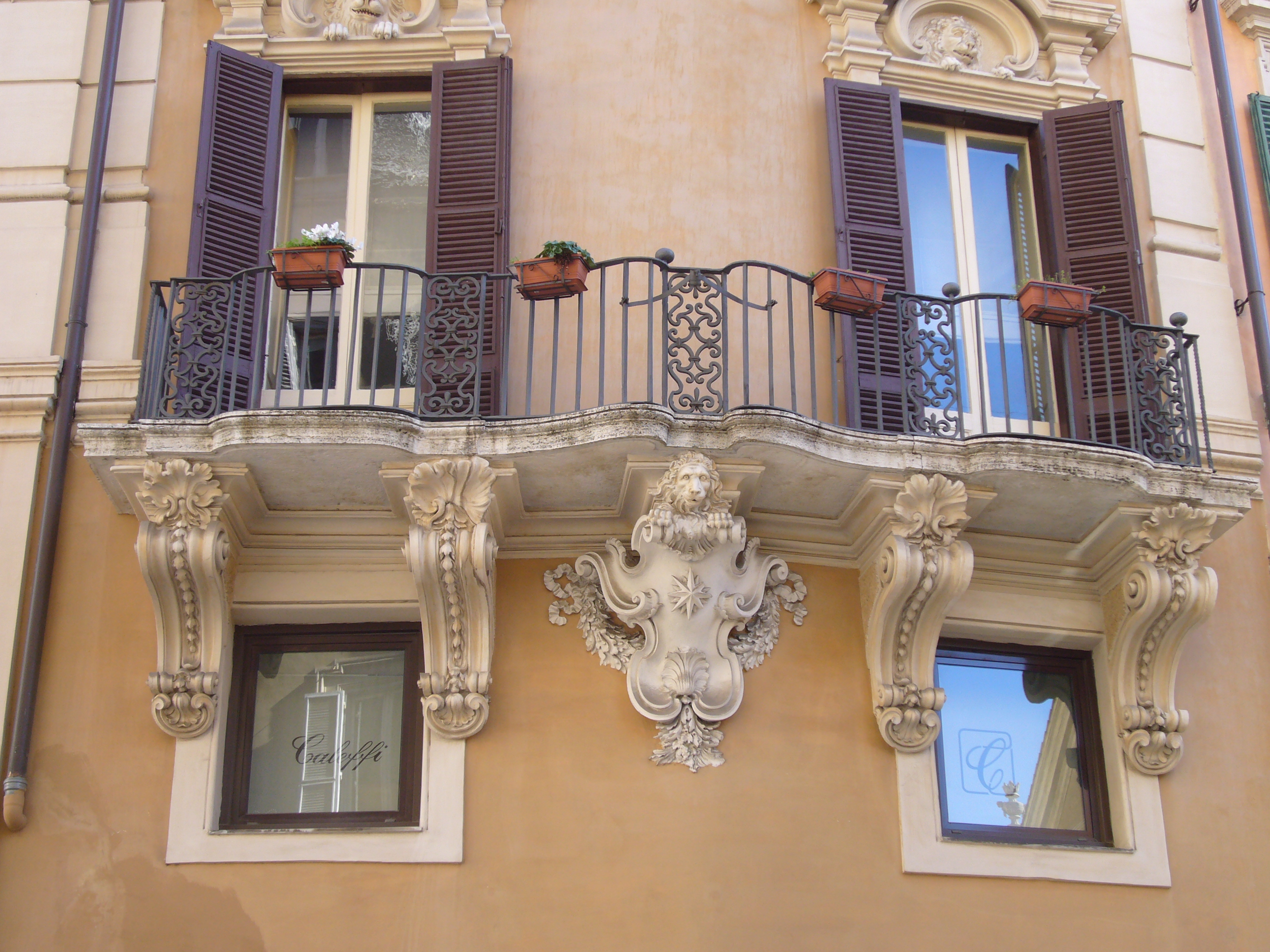 Roma, piazza di Monte Citorio, palazzo del Cinque, balcone.